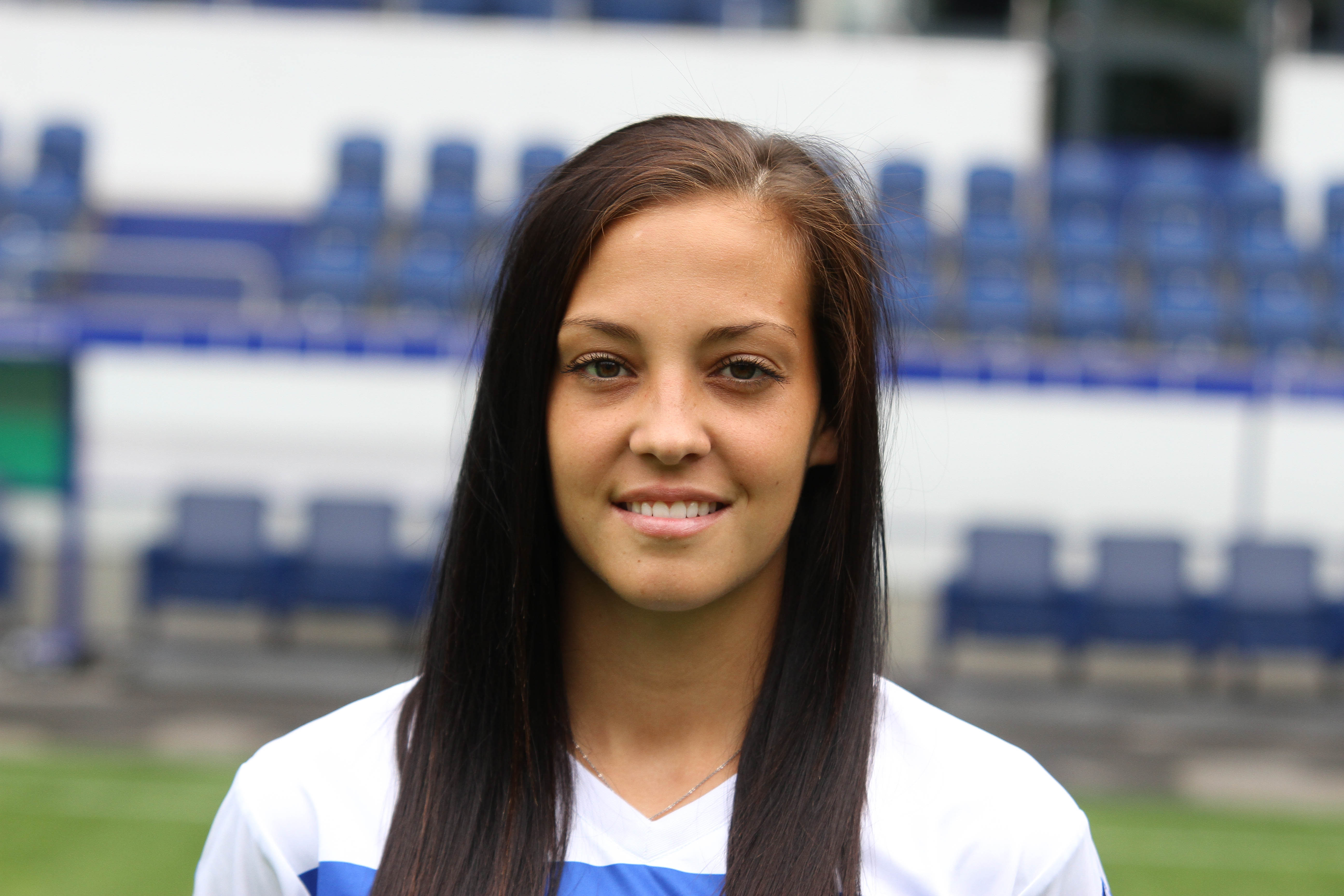 Sofia Nati (2014)